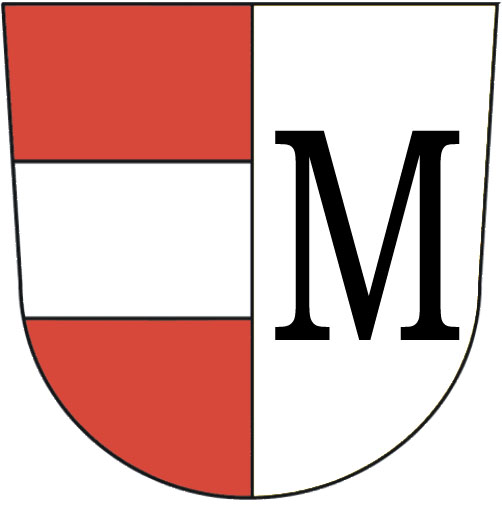 Wappen der Marktgemeinde Mauerbach Bezirk Wien-Umgebung in Niederösterreich.